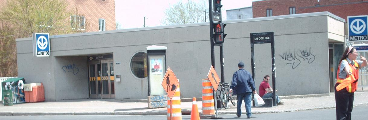 Du College Montreal metro station.